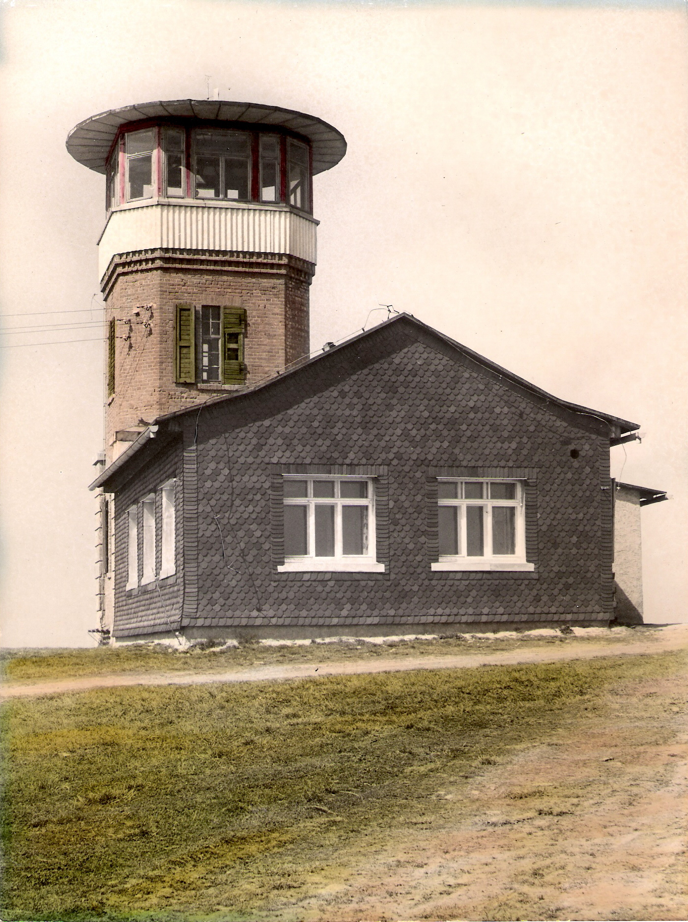 Barigauer Turm Anfang 1960